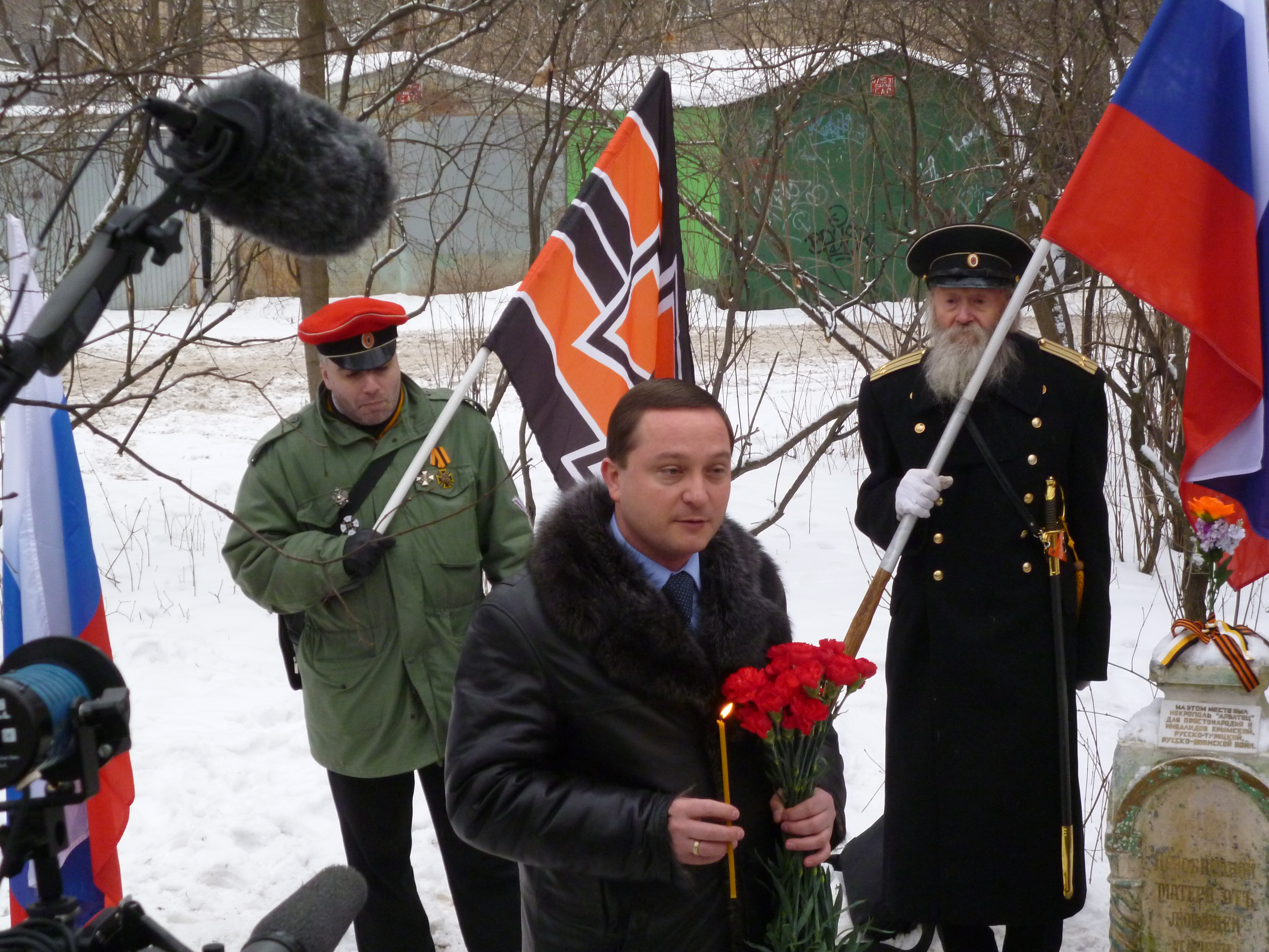 Депутат Роман Худяков на траурном митинге в память жертв русско-японской войны в сквере "Арбатец".